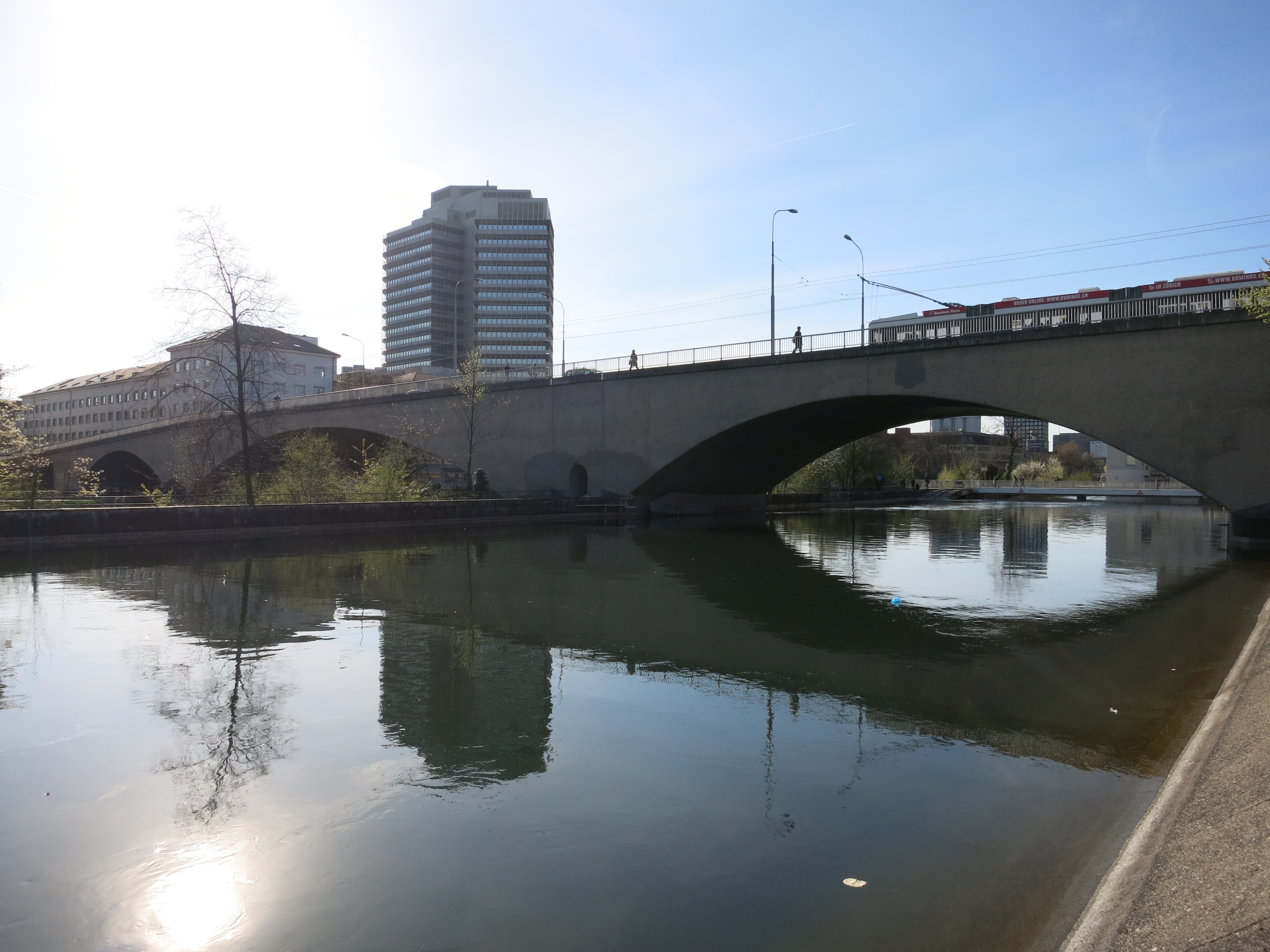 Kornhausbrücke Zürich, Schweiz, flussabwärts gesehen, Migros-Zentrale und städtisches Verwaltungsgebäude im Hintergrund